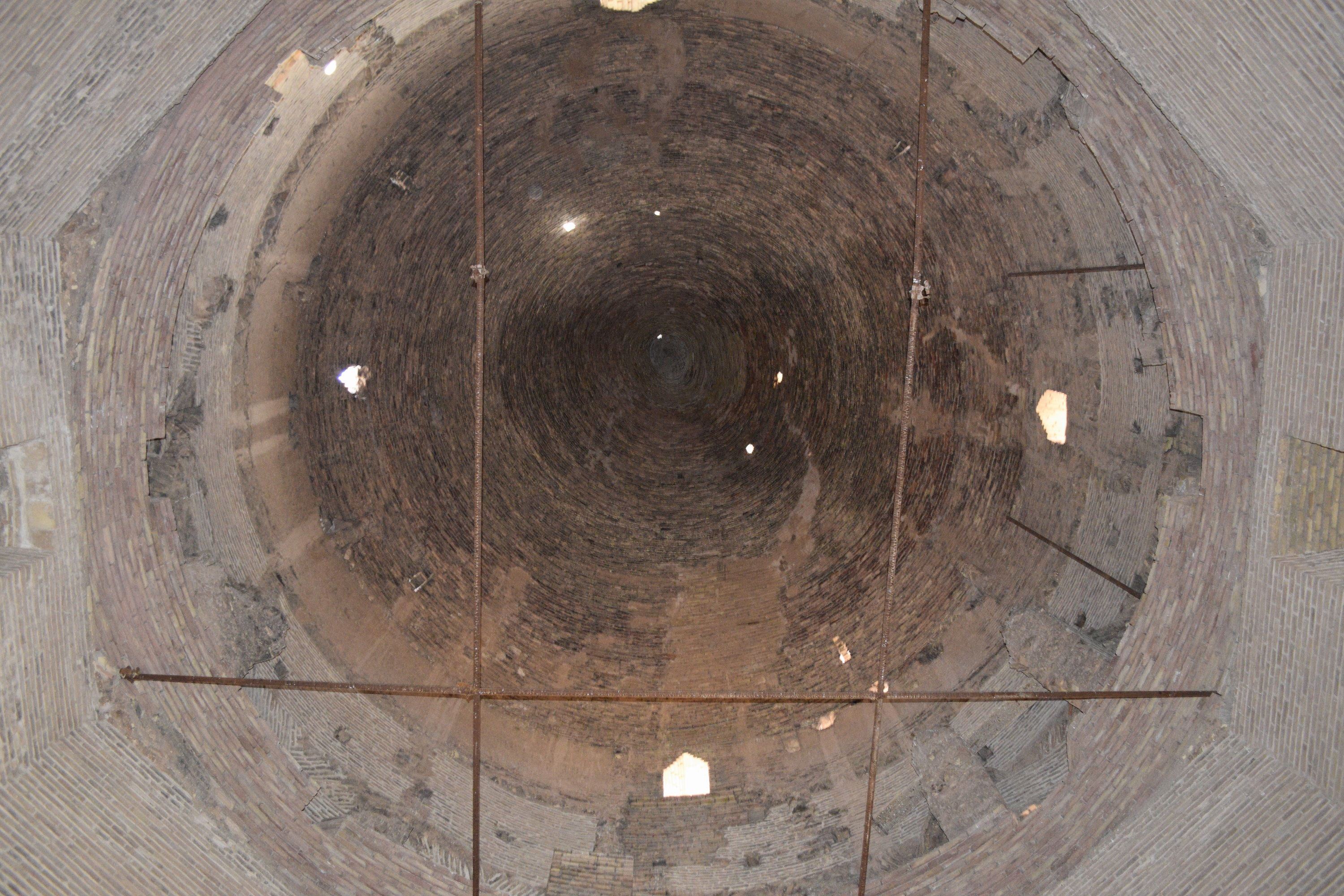 برج مقبره رادکان